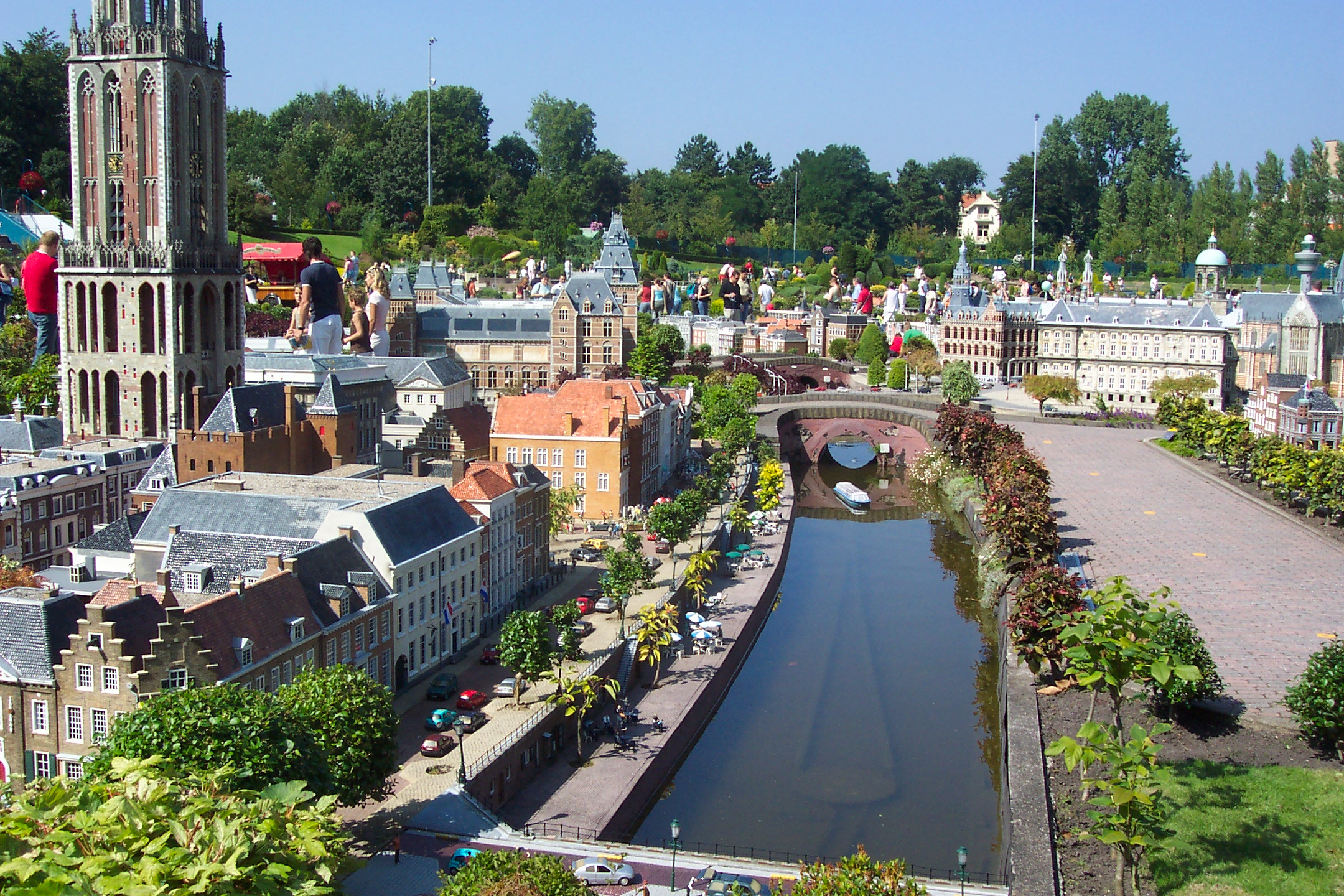 Impression generale du Madurodam